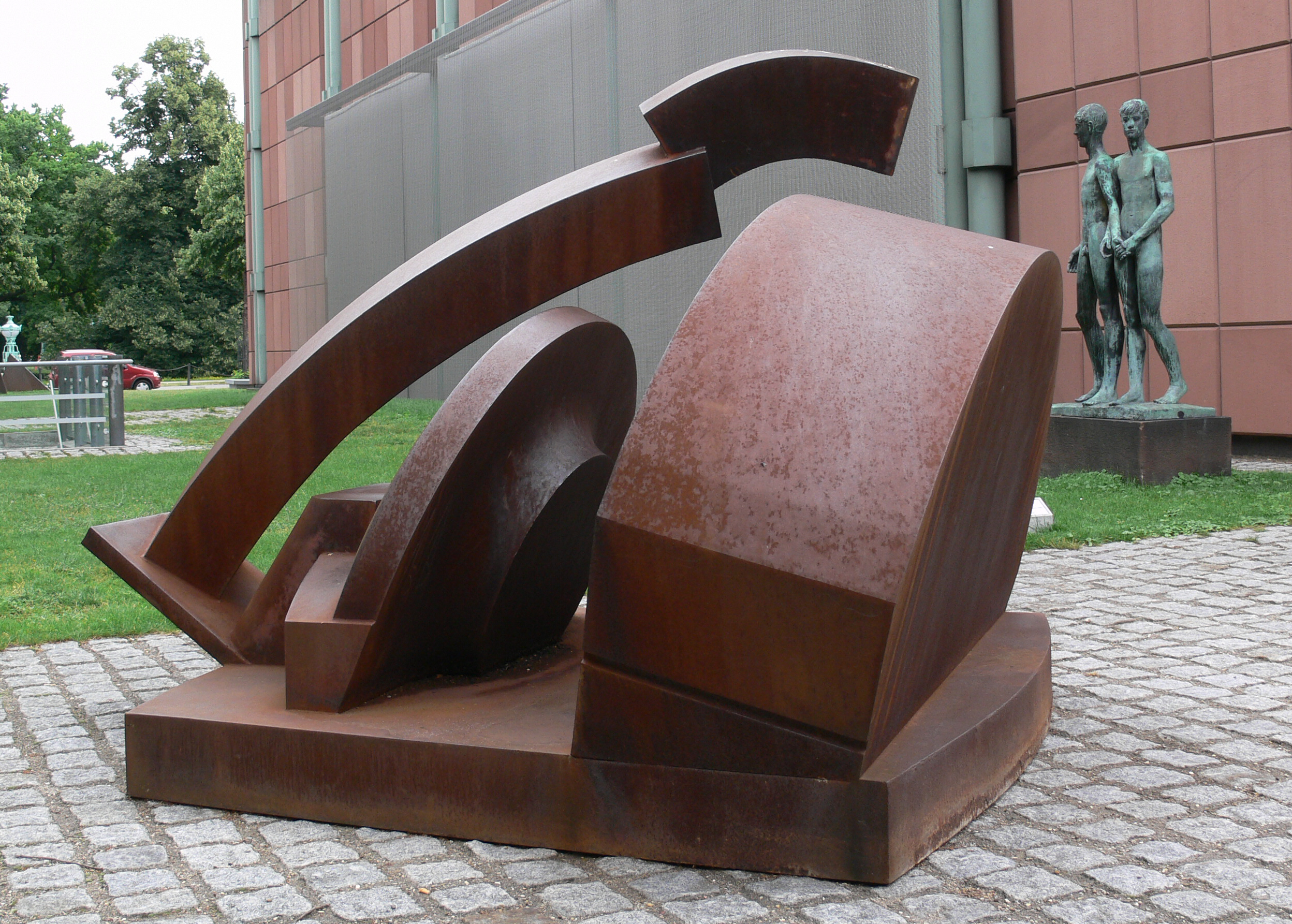 Kunsthalle Mannheim, Skulpturengarten Klaus Duschat: Segmentbogen, Stahl, 1995